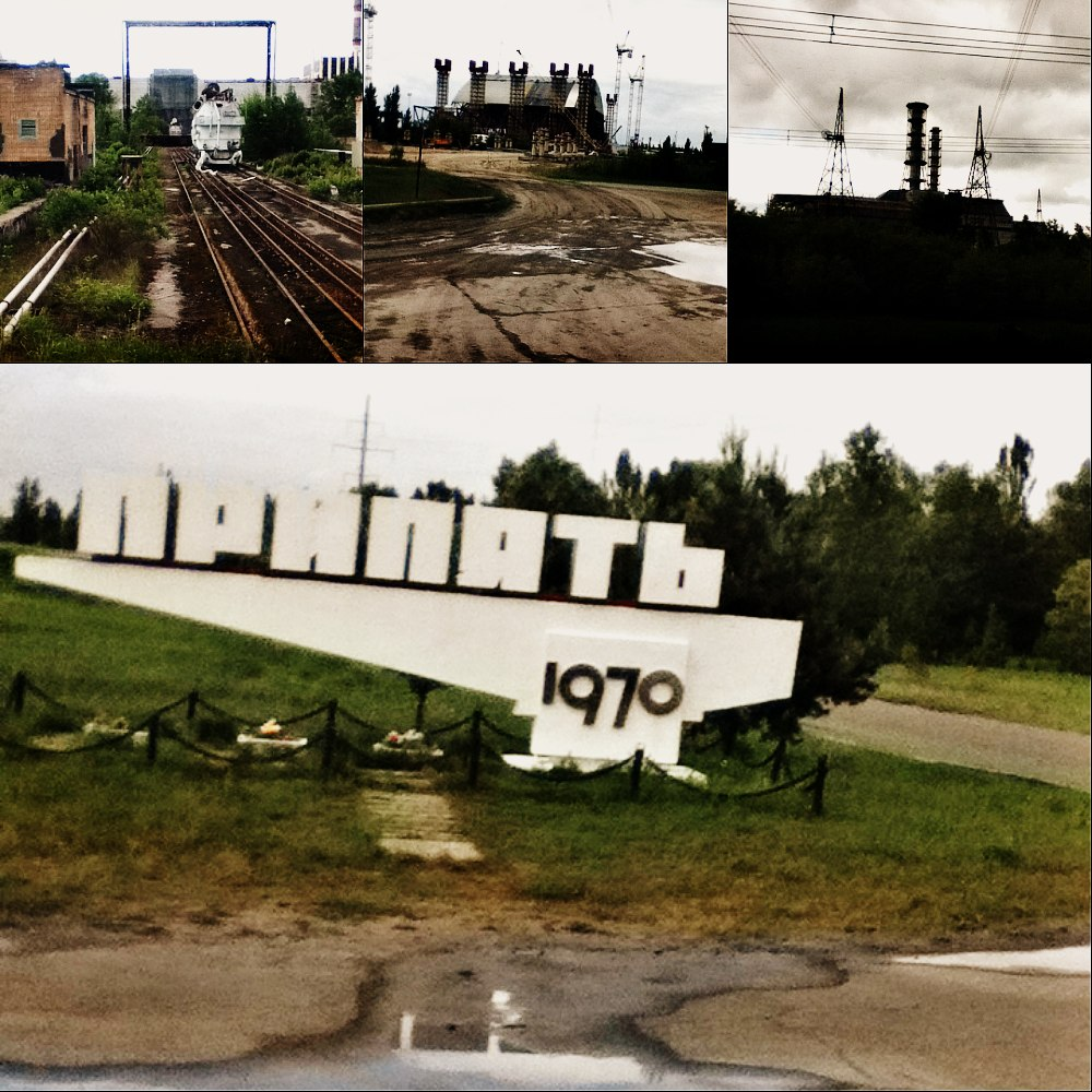 В зоні відчуження